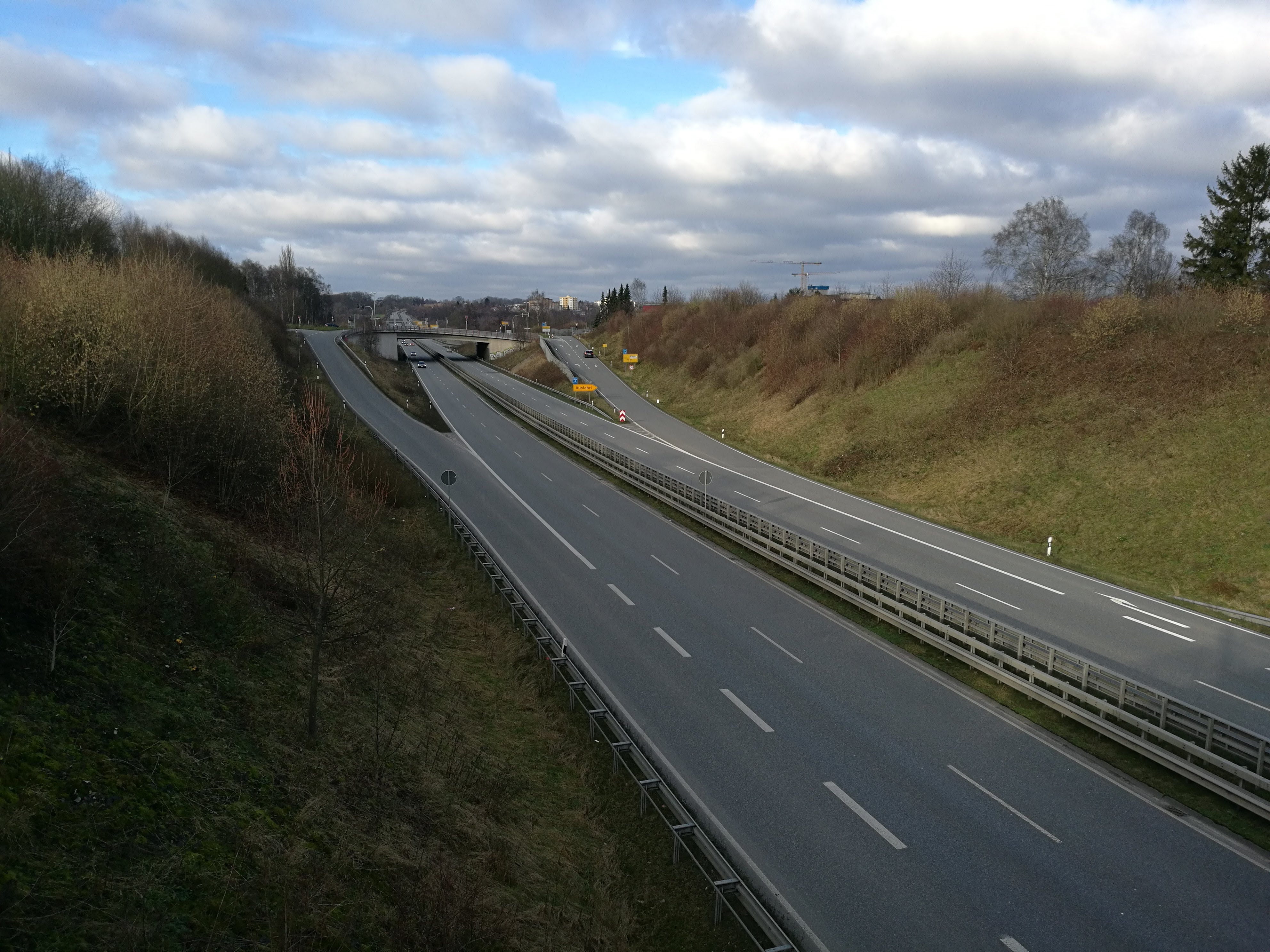 B239 in Herford aus Richtung Brücke Viehtriftenweg